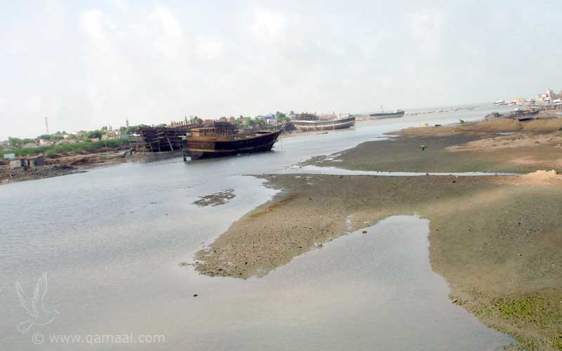 Mandvi Rukmavati River1